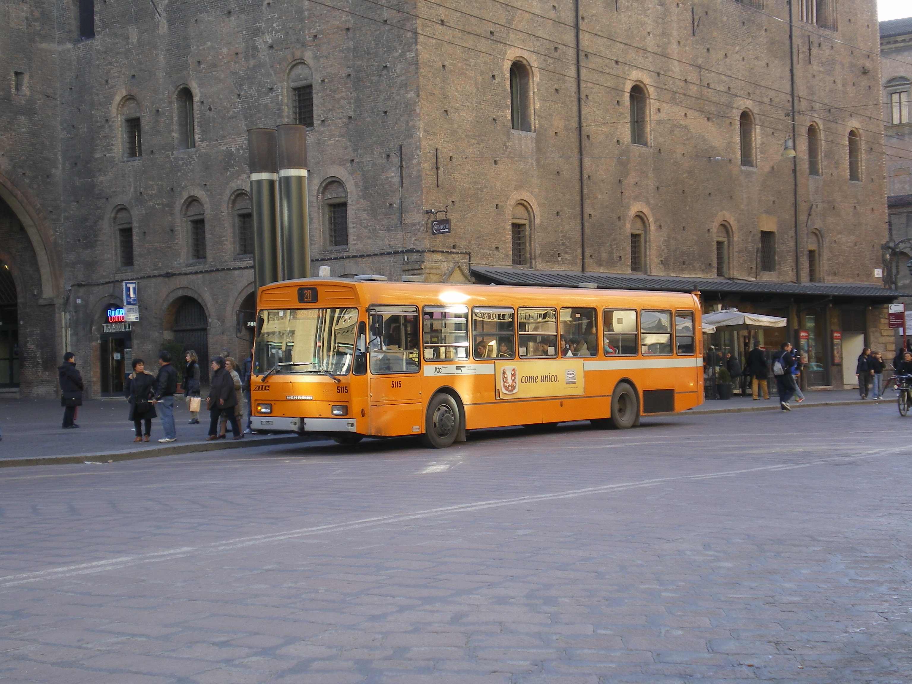 Menarini 201/1LU del 1982 appartenente all'ATC di Bologna in sosta in via Rizzoli. Foto : Edoardo Amadori, 27 febbraio 2007